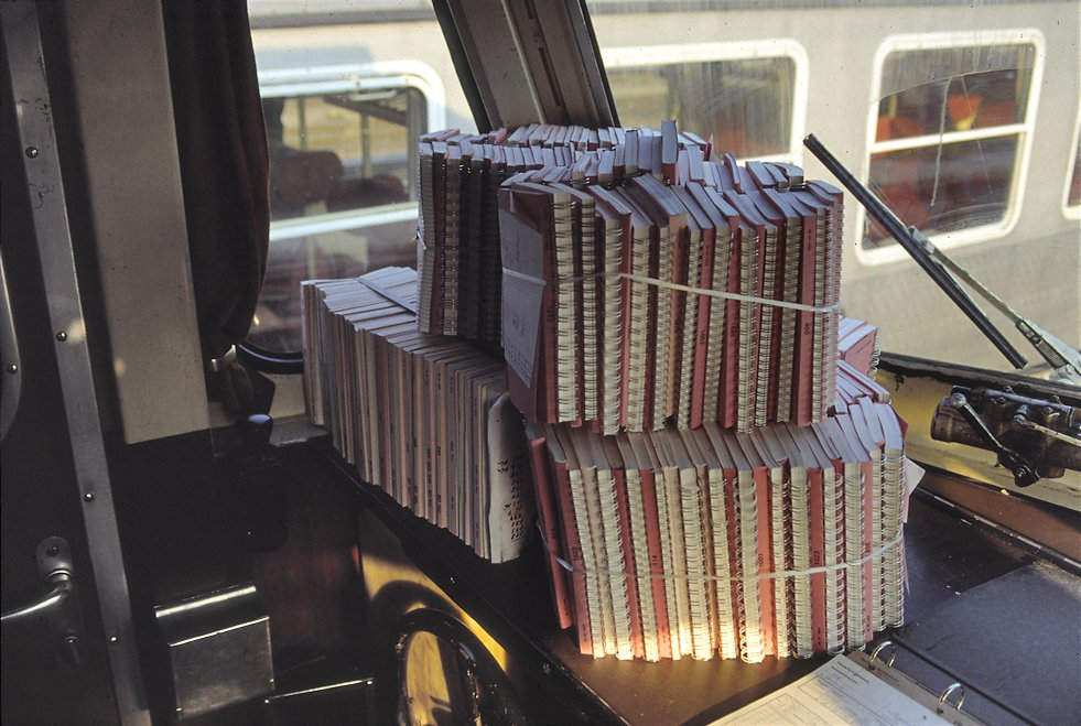 Stapel neuer Buchfahrpläne